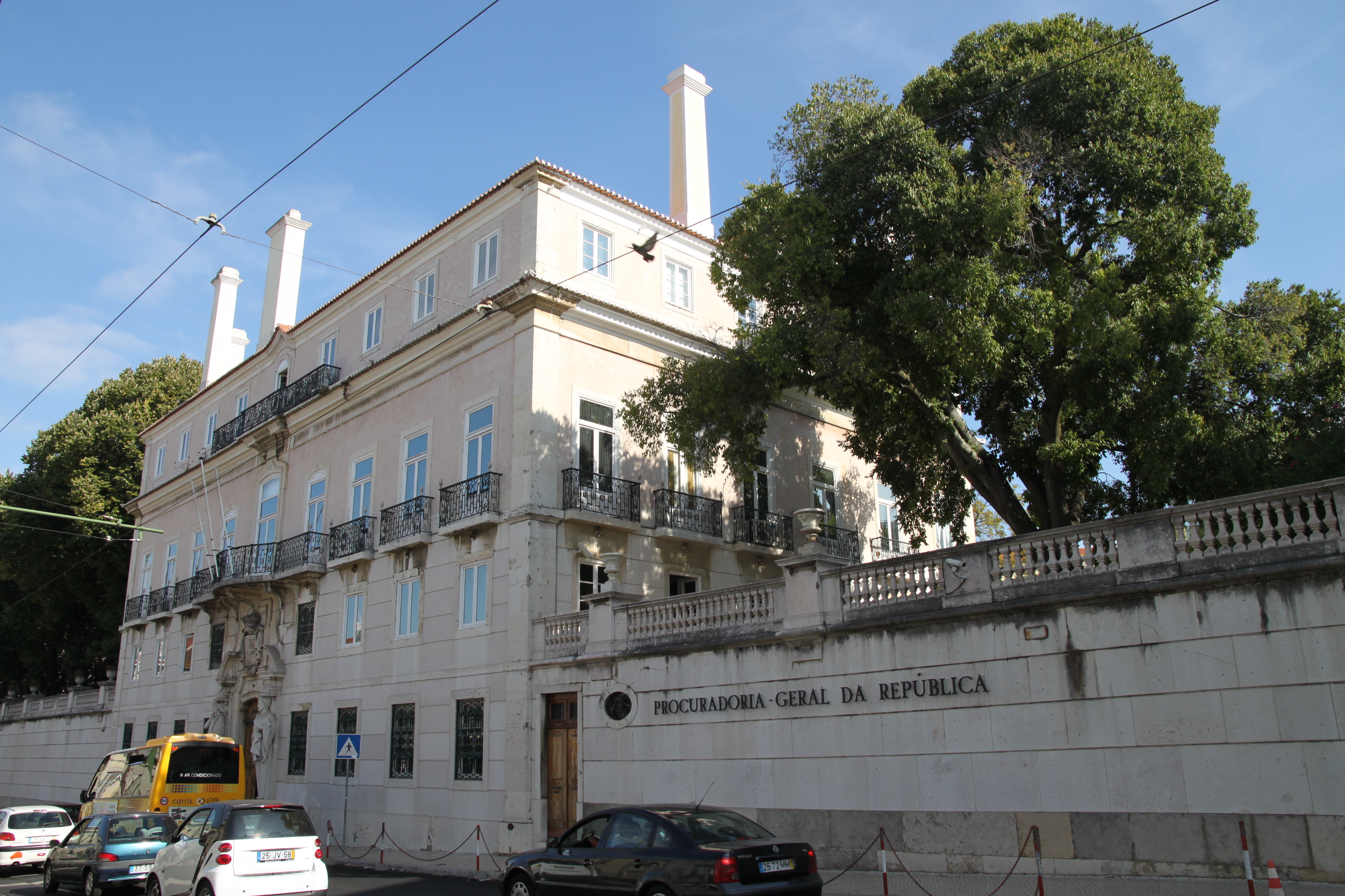 Palácio Palmela This file was uploaded for Wiki Loves Monuments in Portugal with the unique identifier 70772.